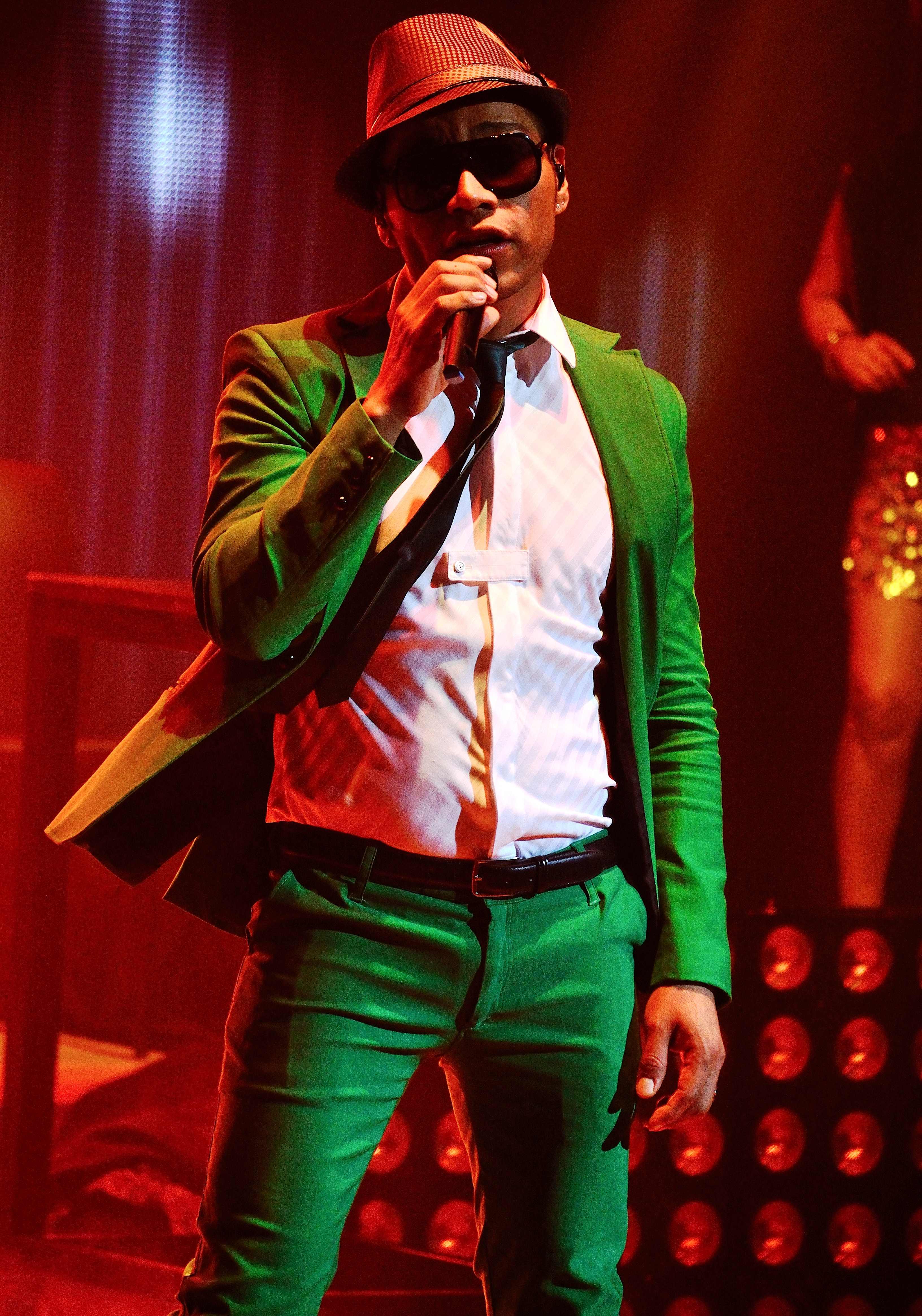 Samo durante el showcase otorgado en Centro Cultural Roberto Cantoral en la Ciudad de México como parte de la promoción de su álbum Inevitable.